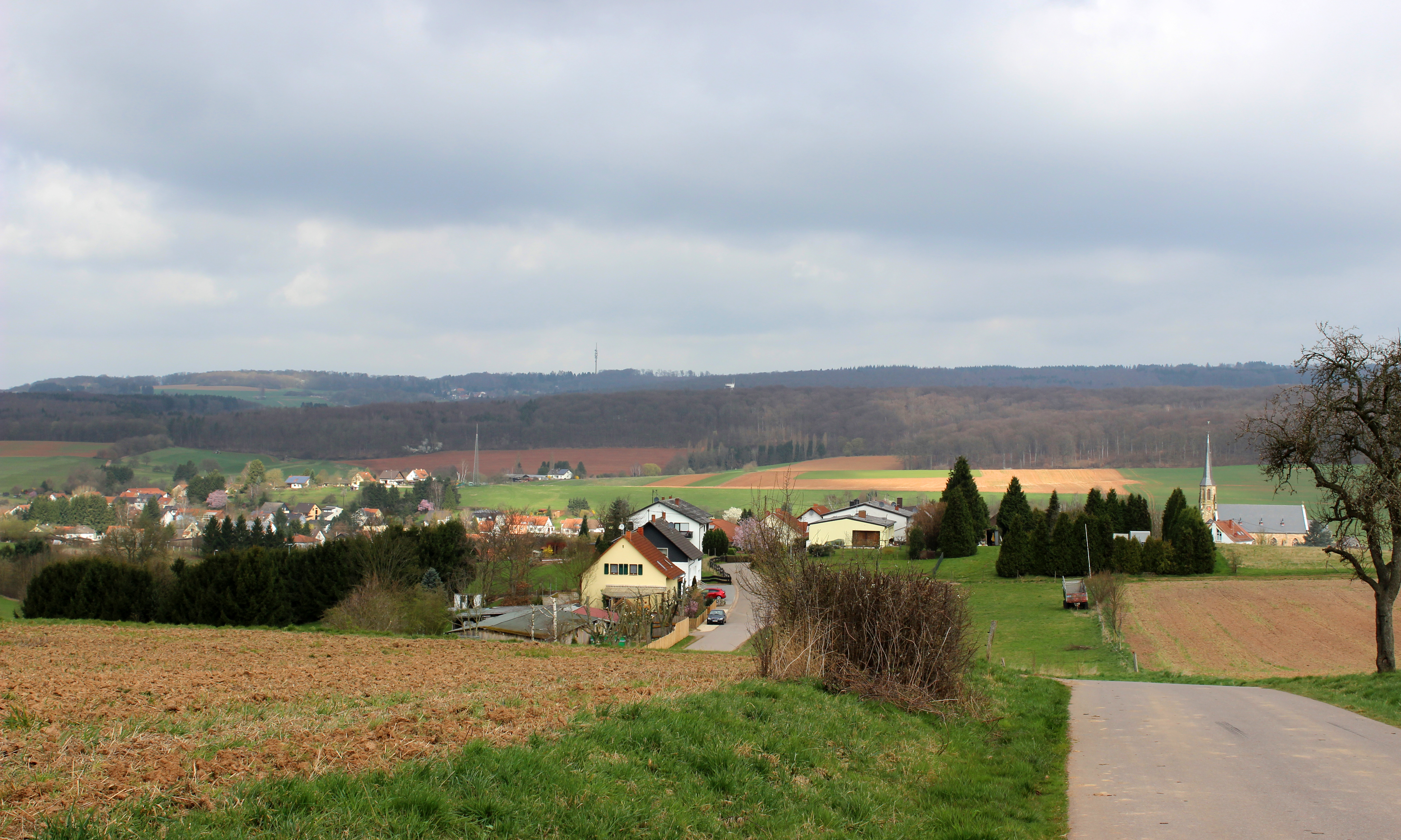 Ansicht von Reisbach, einem Ortsteil der Gemeinde Saarwellingen, Landkreis Saarlouis, Saarland